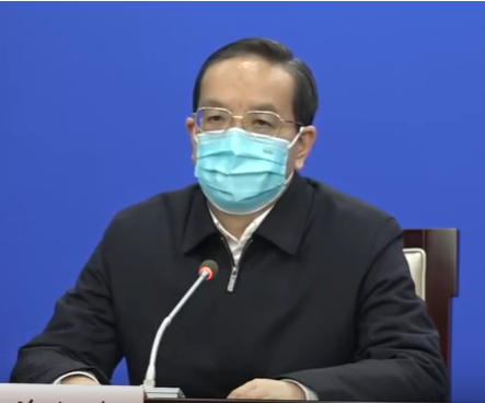 蒋超良 2020.1.30 湖北省委书记 1月30日晚在新闻发布会